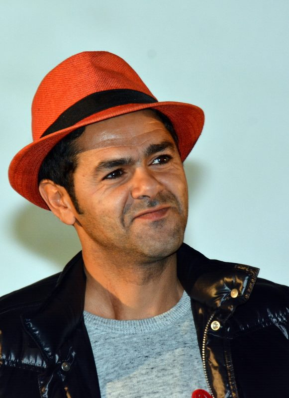 Jamel Debbouze à l'avant-première du film "La Vache"